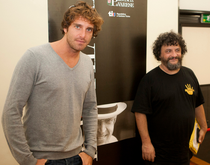 Immagine dall'incontro Ispettore Coliandro - Un tranquillo weekend d'avventura. L'attore Giampaolo Morelli (a sinistra), protagonista della serie televisiva L'ispettore Coliandro, e Marco Manetti (a destra) del duo Manetti Bros., registi della serie TV.